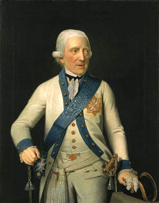 Xavier de Saxe comte de Lusace (1730-1806)